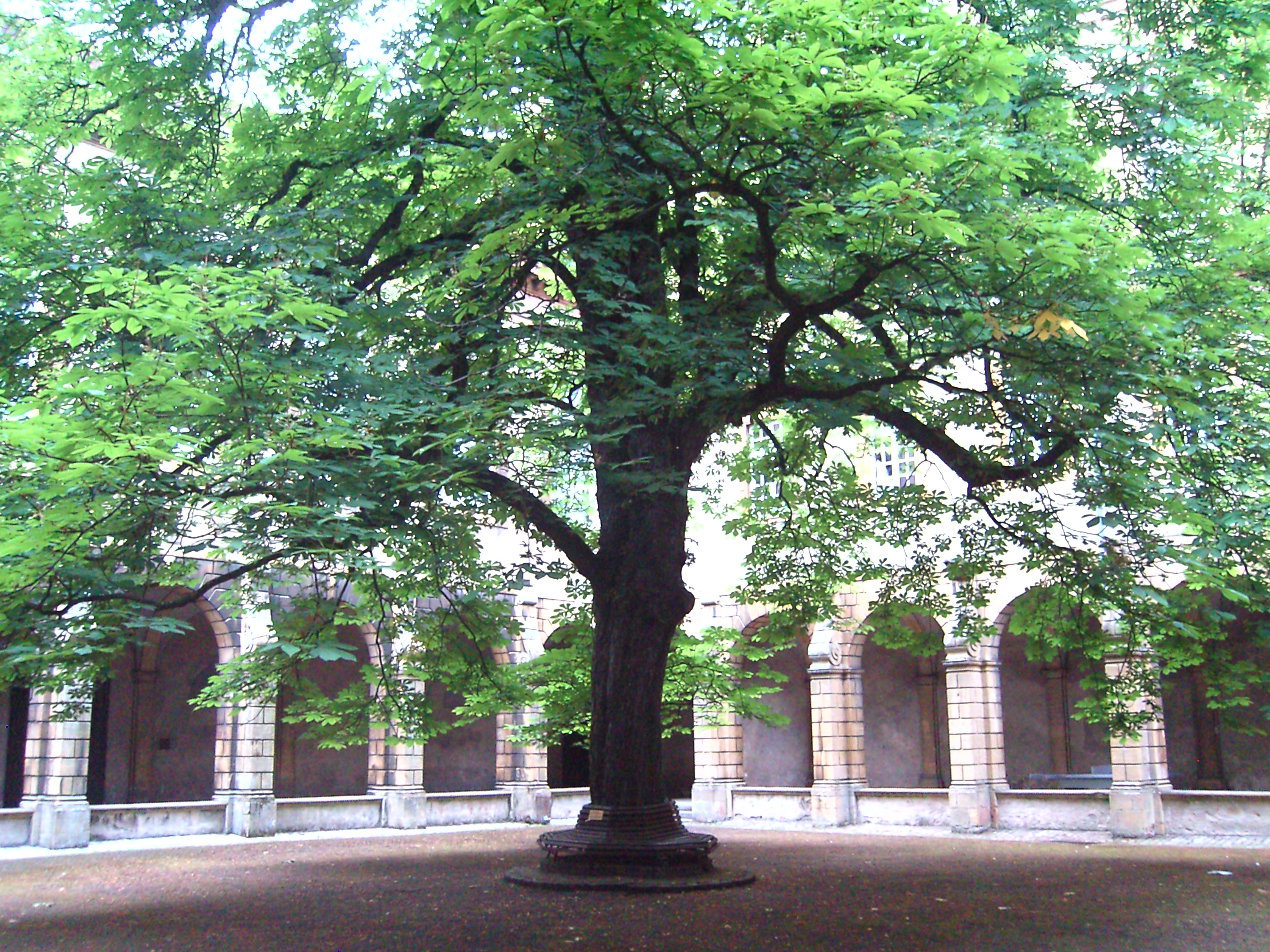 Le cloître du marronnier se trouvant à l'intérieur du bâtiment de l'abbaye.